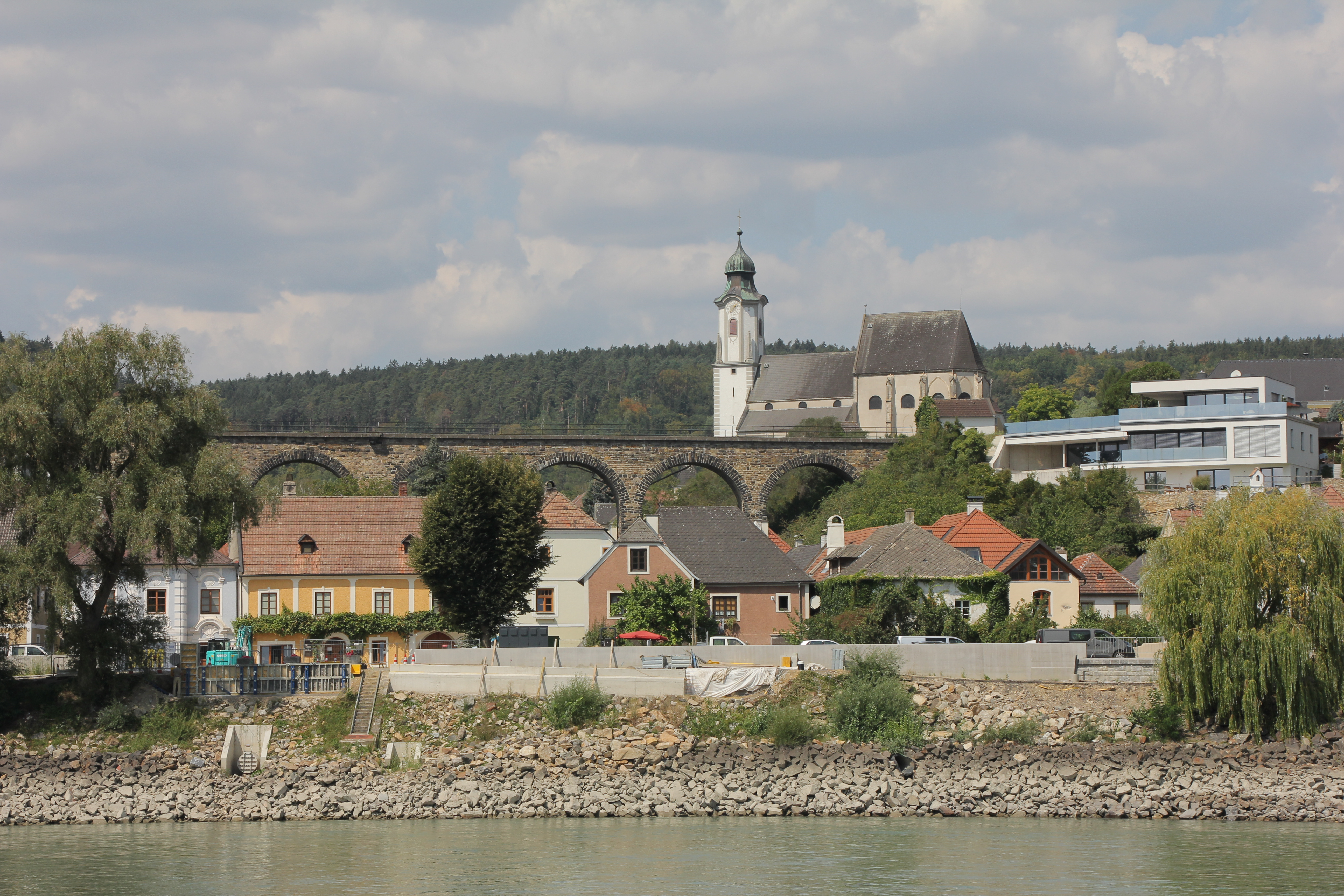 Eindrücke bei einer Schifffahrt durch die Wachau